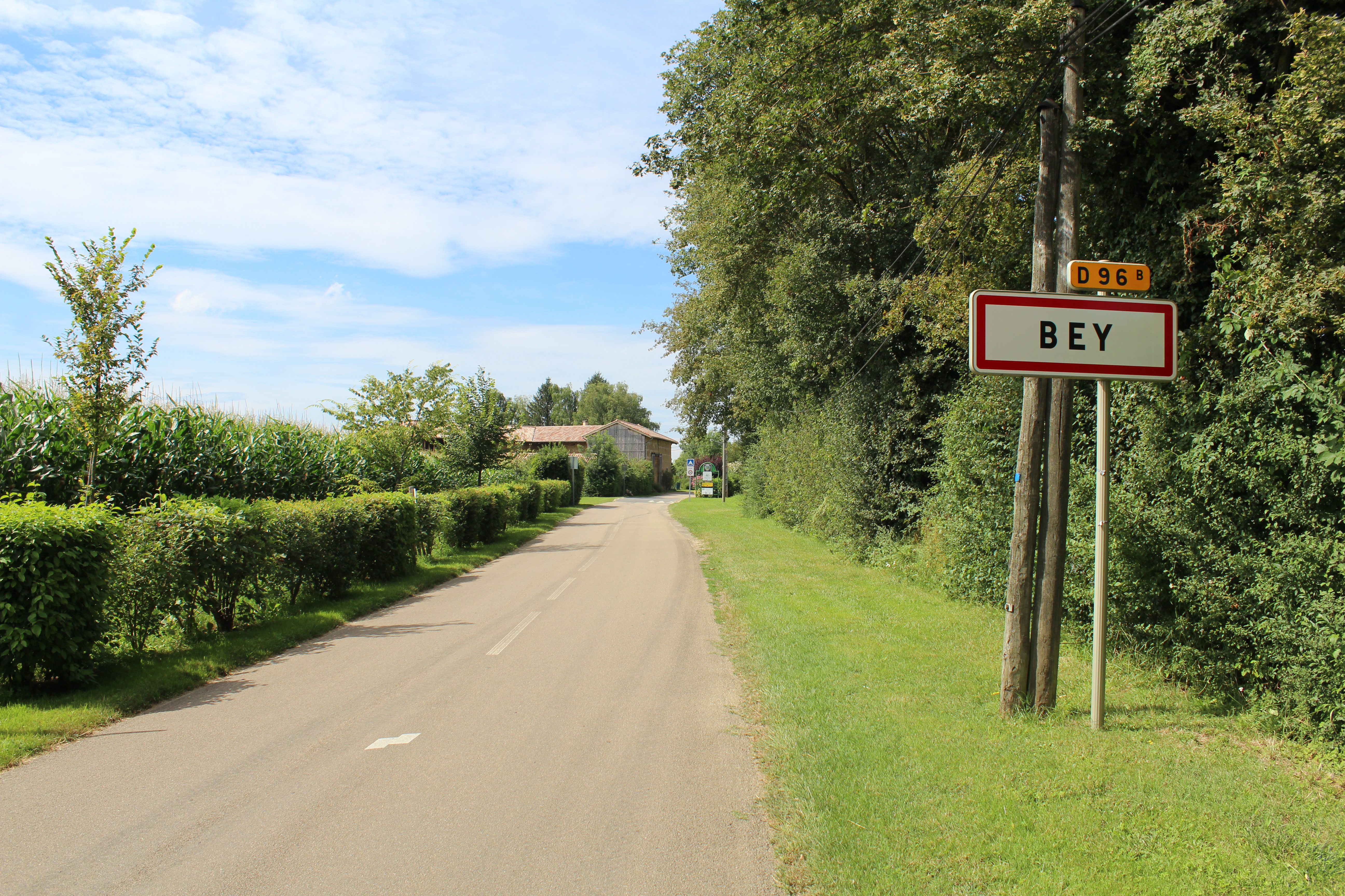 Panneau d'entrée de Bey dans l'Ain sur la route départementale D96b.